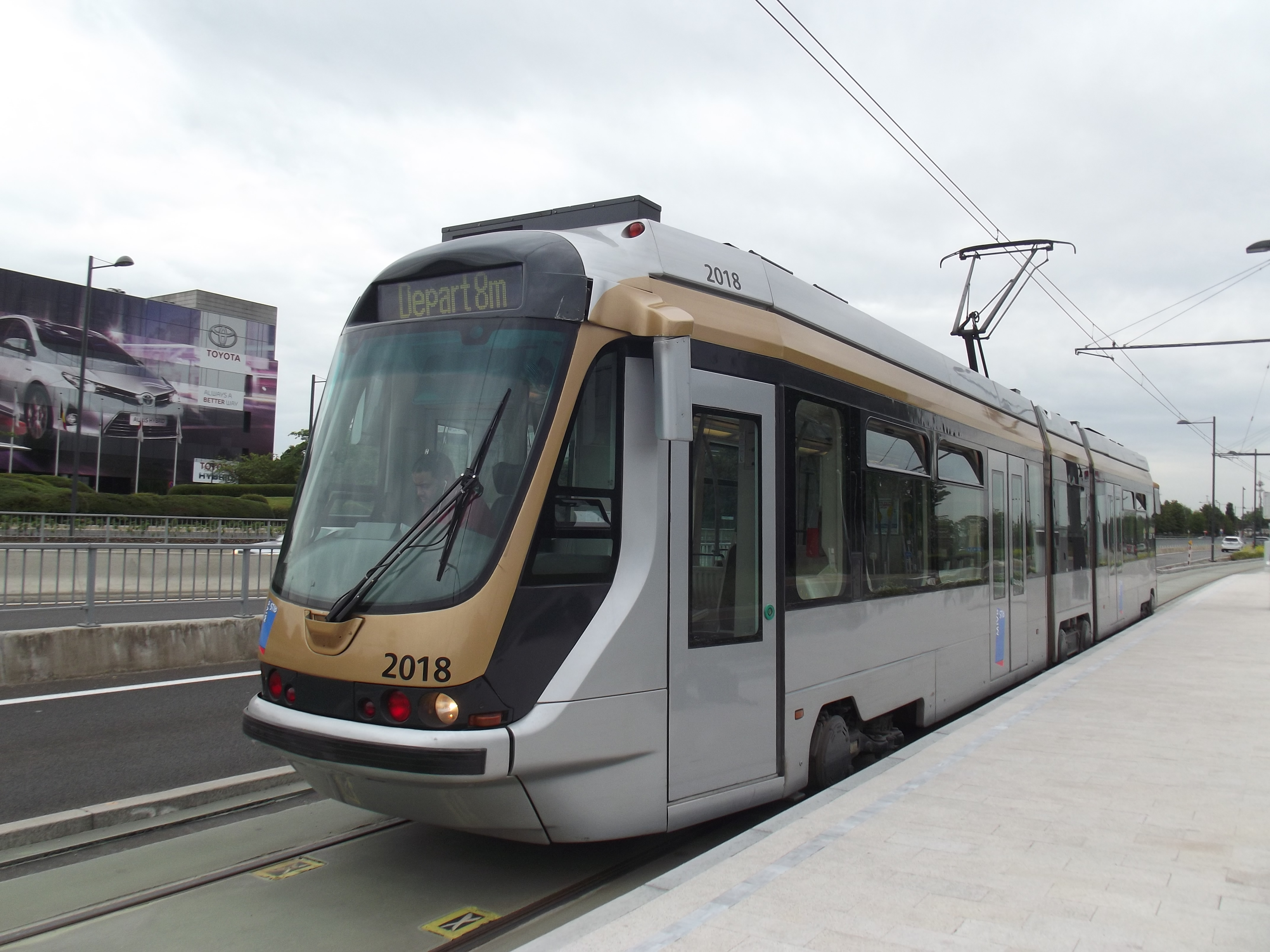 Nieuwe eindhalte Eurocontrol voor tramlijn 62